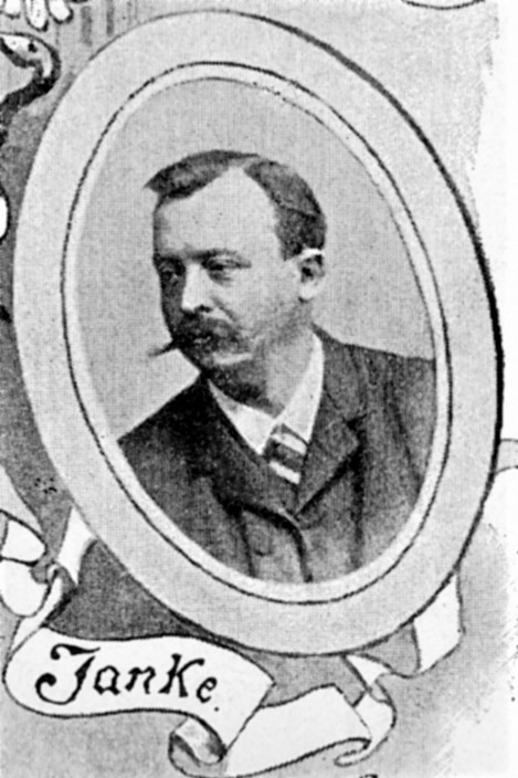 Porträt Gustav Janke, Verlag von Otto Janke